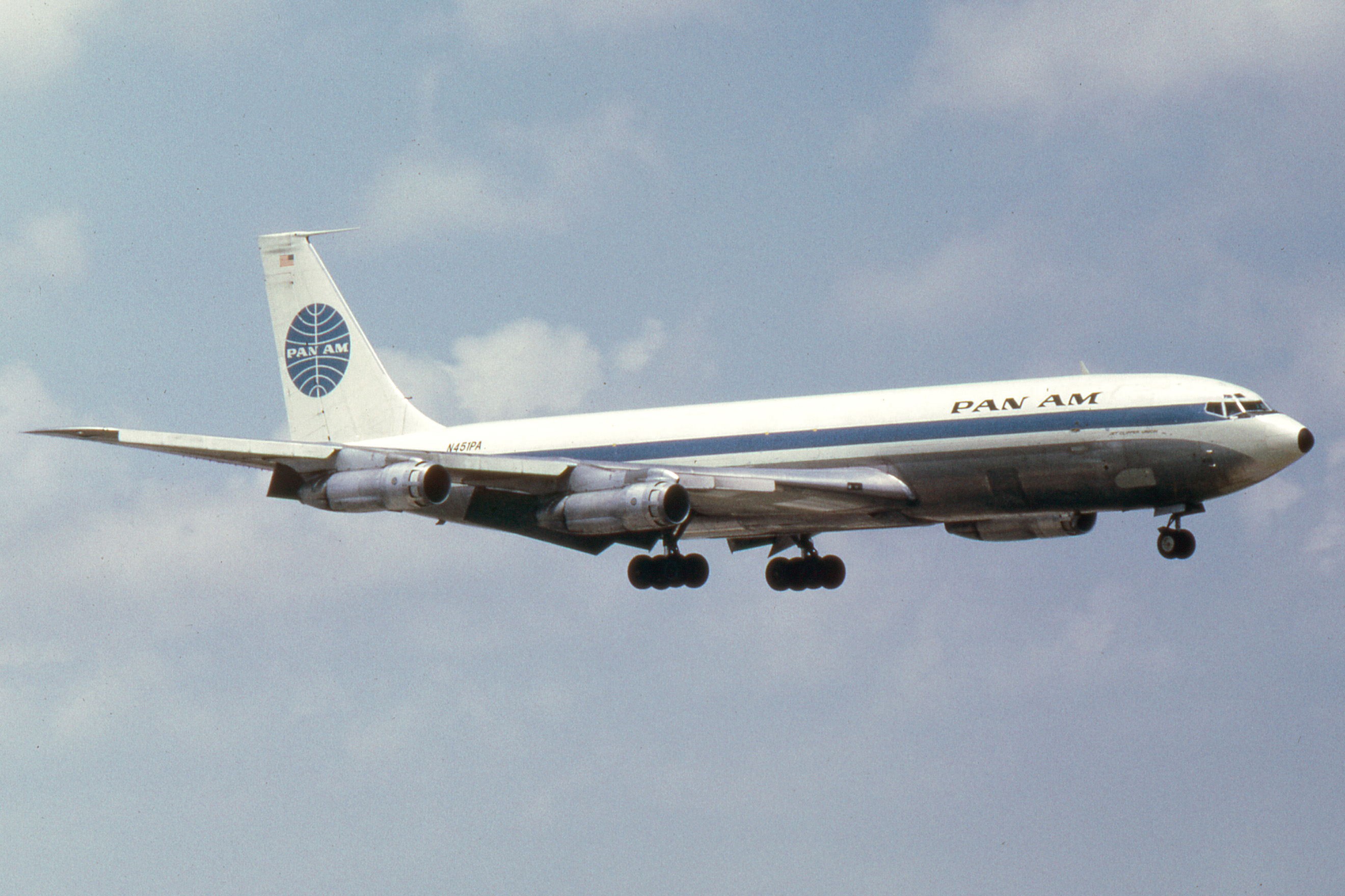 Miami 1971